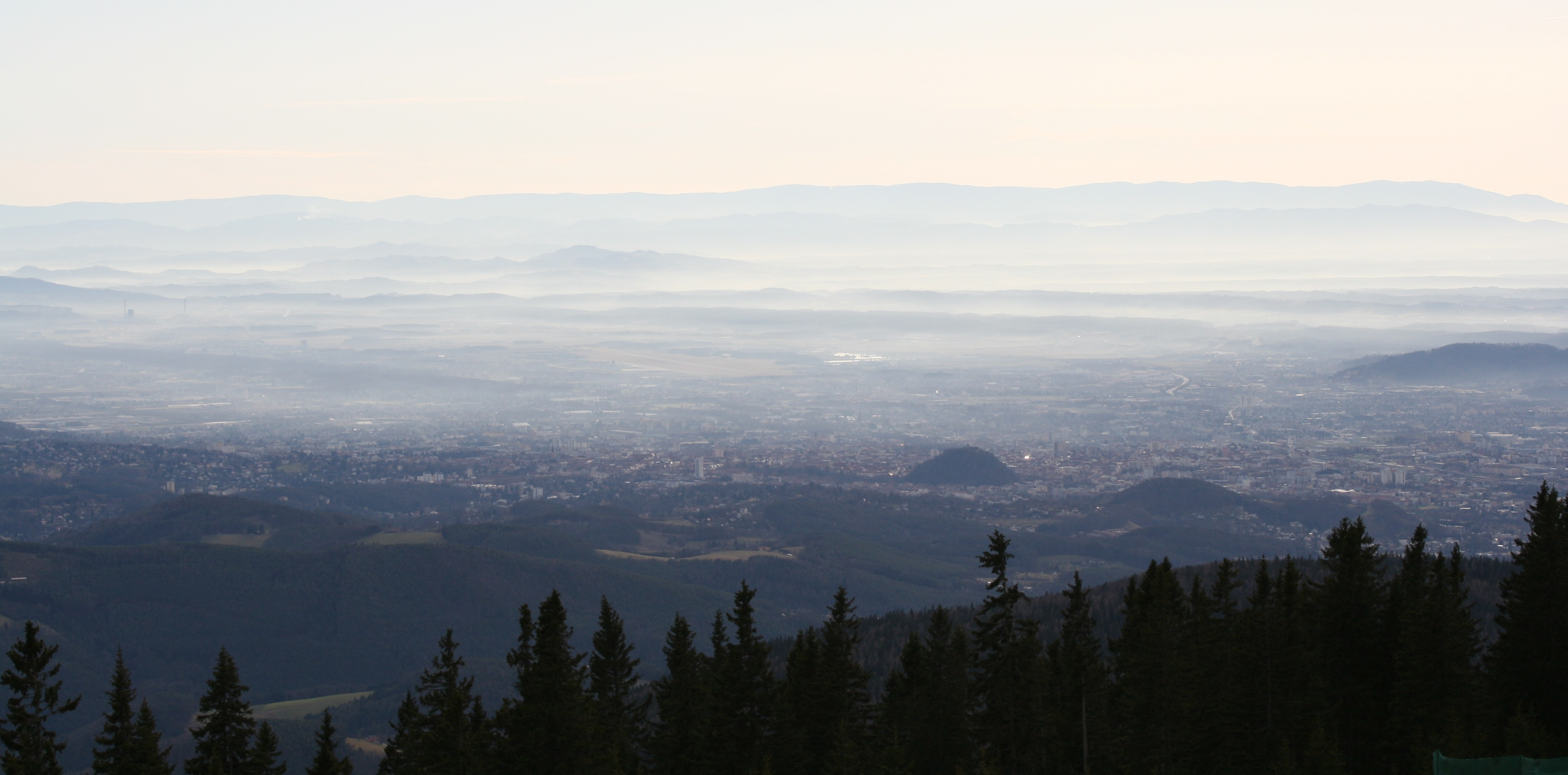 Graz, vom Gipfel des Schöckl (auch: Schöckel) aus gesehen (im Nebel)